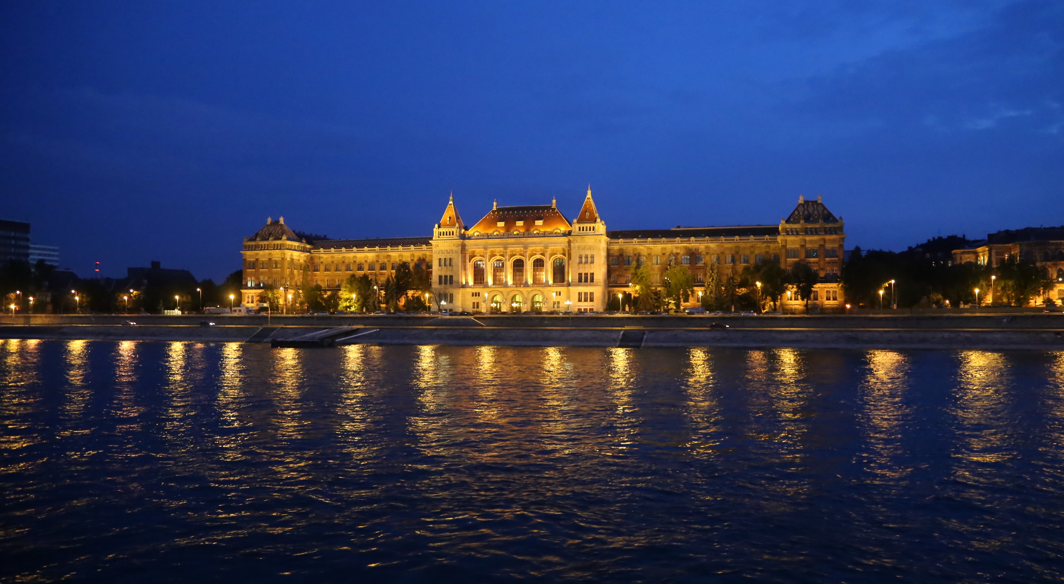 Budapesti Műszaki Egyetem K épülete This is a photo of a monument in Hungary. Identifier: 1110